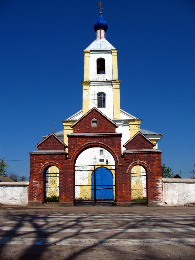 Беларуская (тарашкевіца): Лужкі